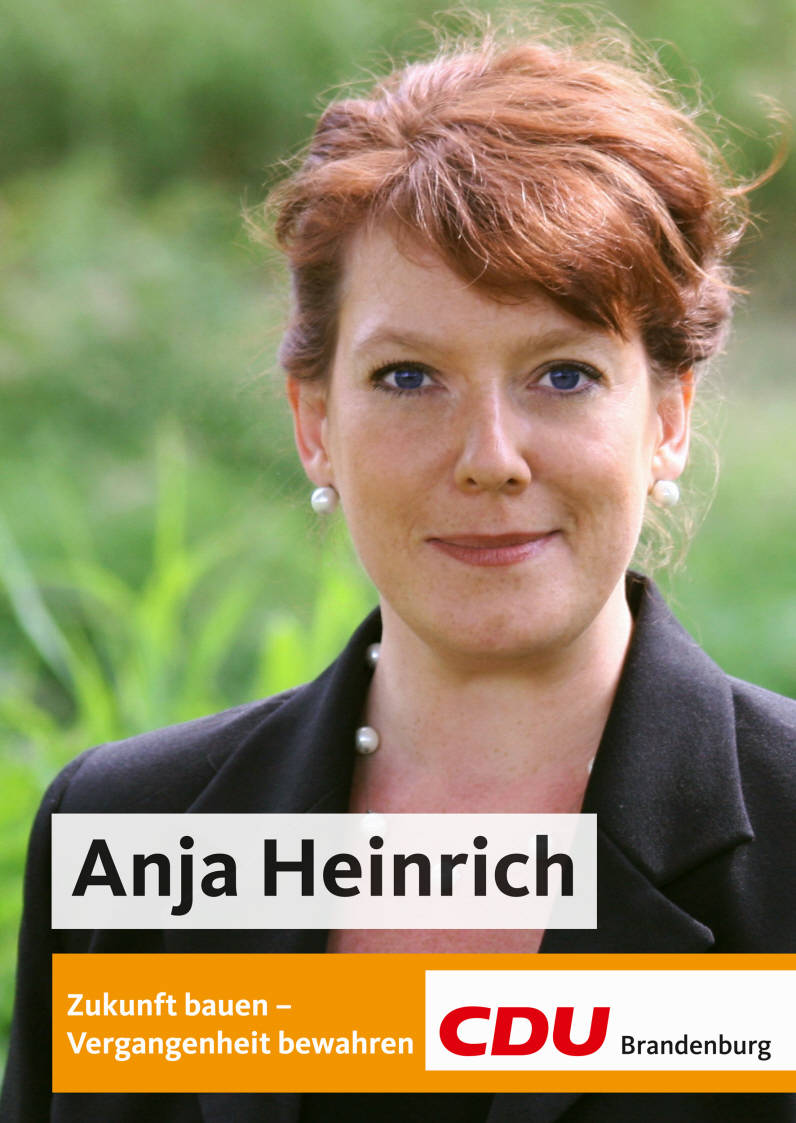 Anja Heinrich Zukunft bauen - Vergangenheit bewahren CDU BrandenburgAbbildung:PorträtfotoPlakatart:Kandidaten-/Personenplakat mit PorträtKünstler_Grafiker:Frenkelson Werbeagentur, PotsdamAuftraggeber:CDU BrandenburgObjekt-Signatur:10-033 : 1023Bestand:Landtagswahlplakate Brandenburg ( 10-033)GliederungBestand10-18:Landtagswahlplakate Brandenburg (10-033) » CDULizenz:KAS/ACDP 10-033 : 1023 CC-BY-SA 3.0 DE